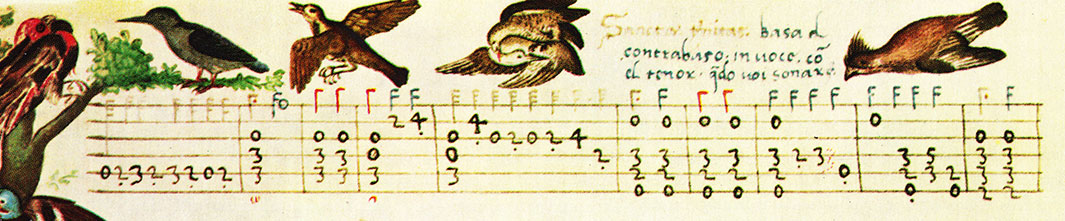 przykład tabulatury lutniowej włoskiej: Tabulatura lutniowa włoska, fragment intawolatury Sancta Trinitas Vincenzo Capiroli.